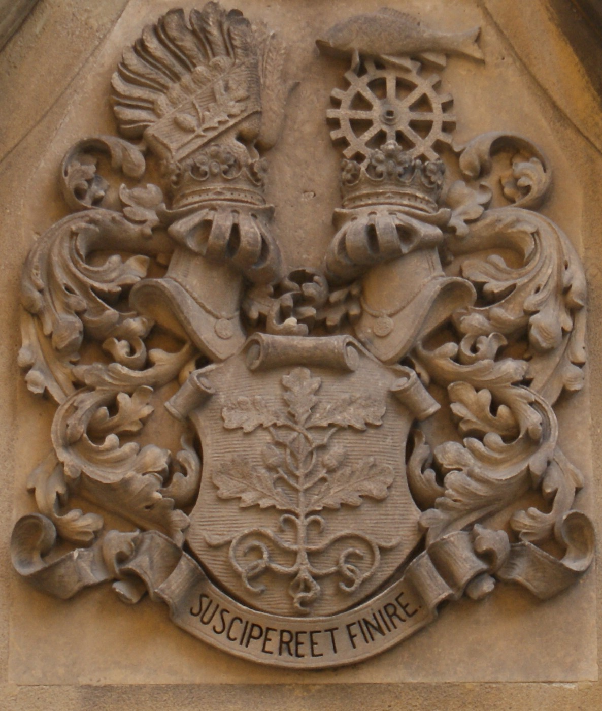 erb Daubků - kostel sv. Petra a Pavla Liteň